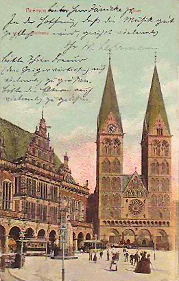 1908 Old images